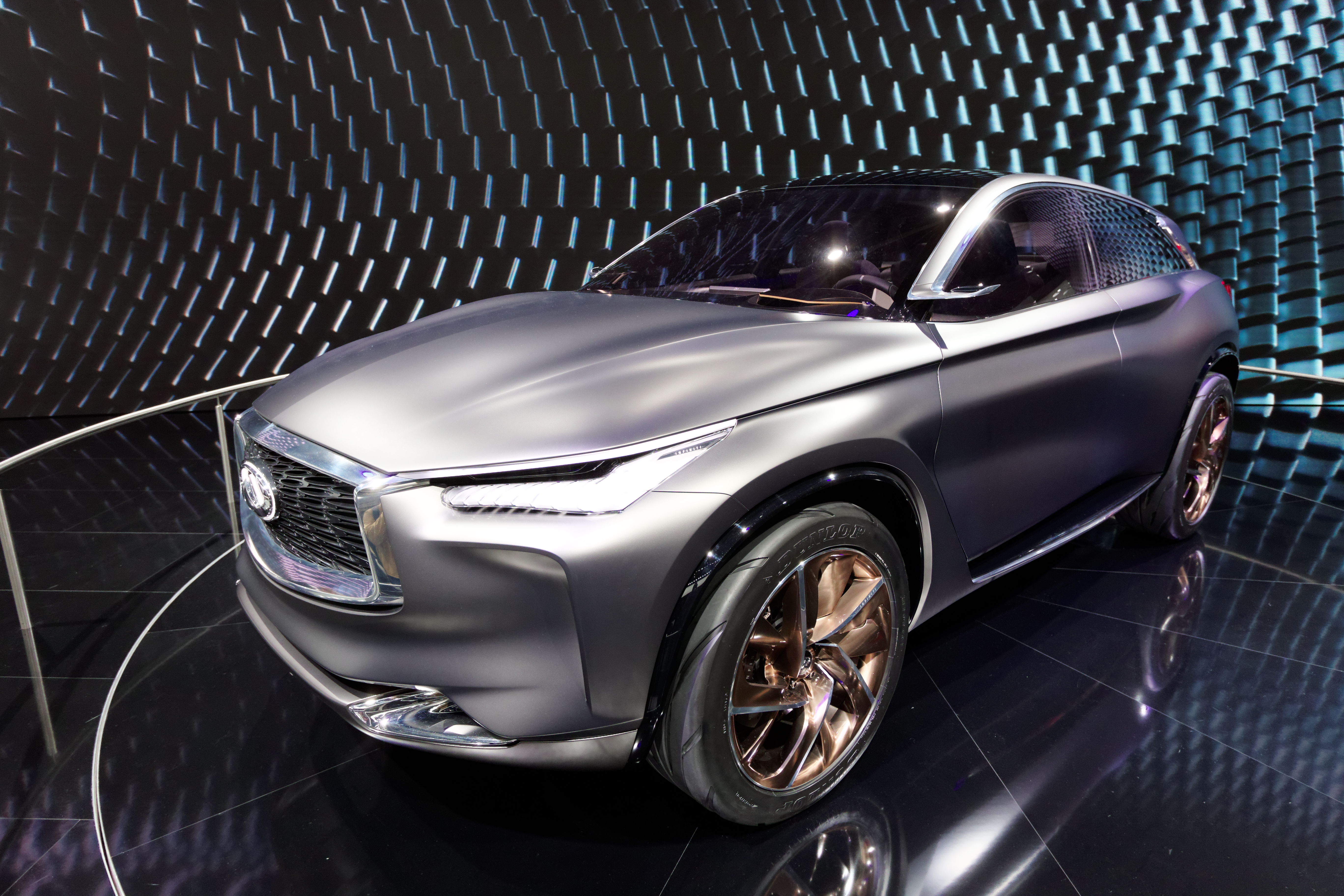 Une Infiniti QX Sport présentée lors du mondial de l'automobile de Paris 2016.